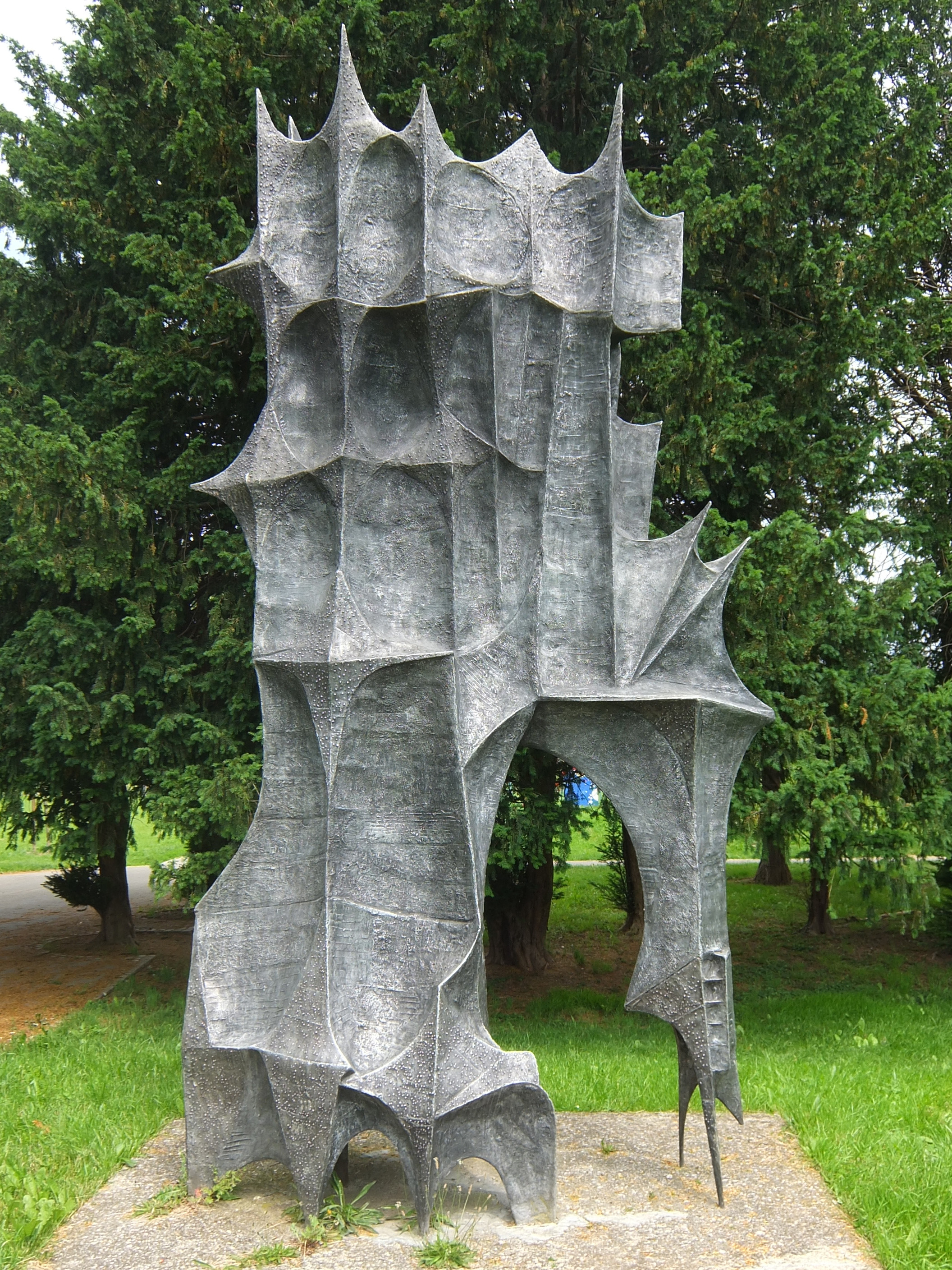 Srpskohrvatski / српскохрватски: Spomenik Prosinačkim žrtvama 1943. u zagrebačkoj Dubravi, rad kipara Dušana Džamonje